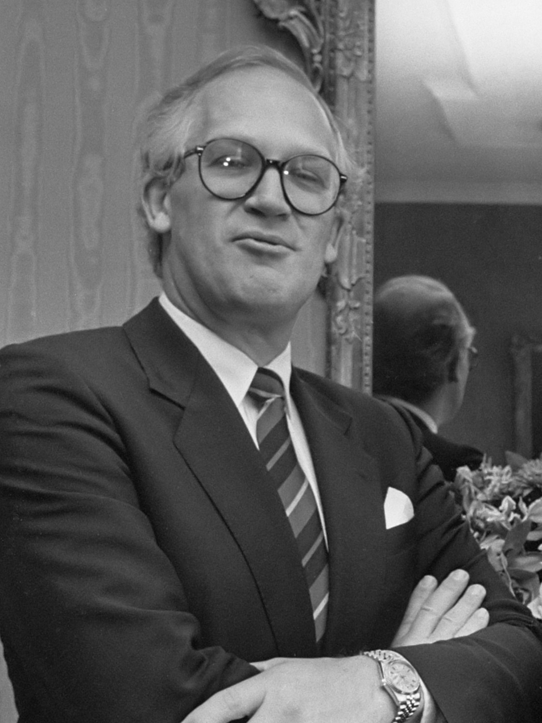 Opdracht Financieel Dagblad 7 november 1986